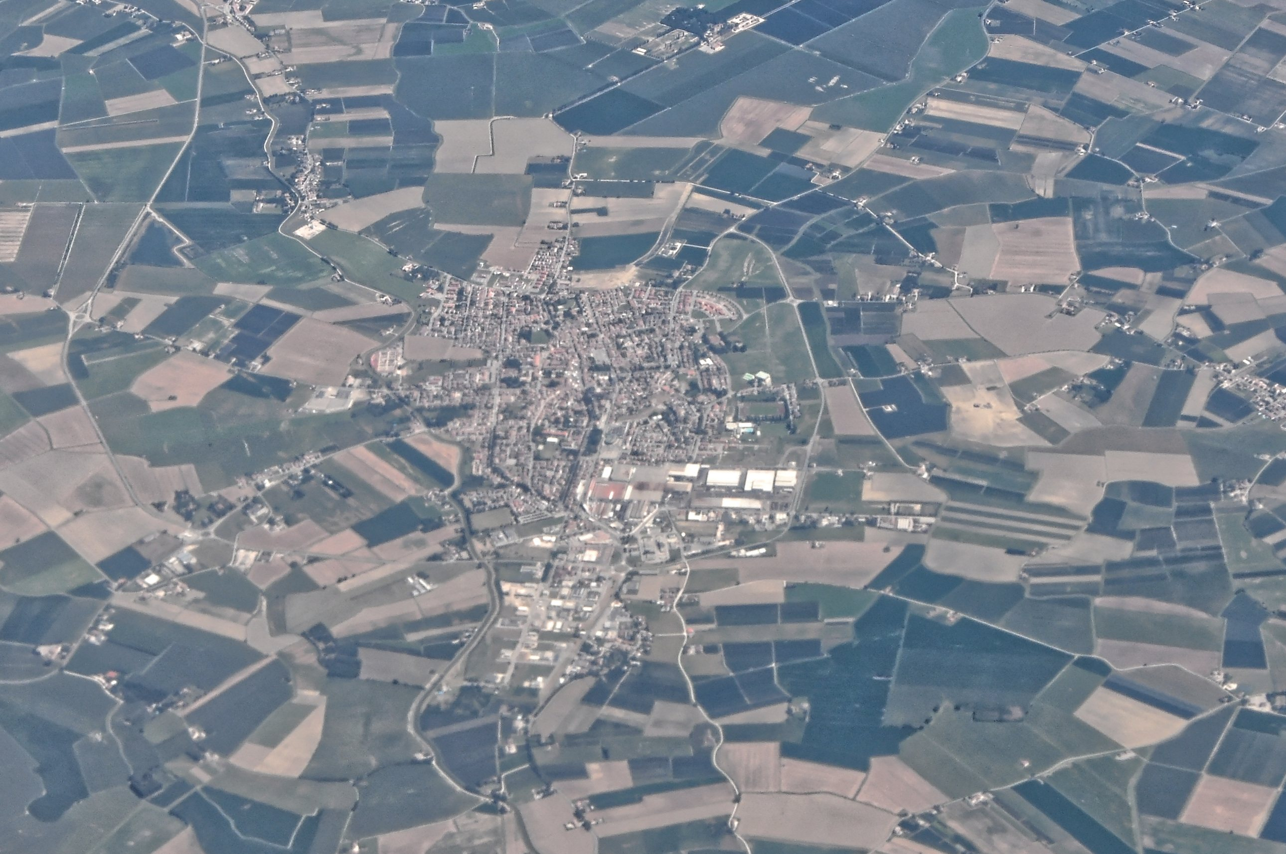 Bilder vom Flug -Rom-Düsseldorf-Hamburg 2013 Dieses Foto entstand in Zusammenarbeit mit Stadtbesichtigungen.de Die Seiten Stadtbesichtigungen.de, der dazugehörige Reise Blog sowie die Facebookseite: Stadtbesichtigungen Rom dürfen dieses Bild für Ihre Veröffentlichungen ohne den Hinweis auf Wikipedia, Commons bzw der Lizenz verwenden. Die Verantwortlichen habe von mir (Ra Boe) die Originaldaten zur freien Verfügung übermittelt bekommen.